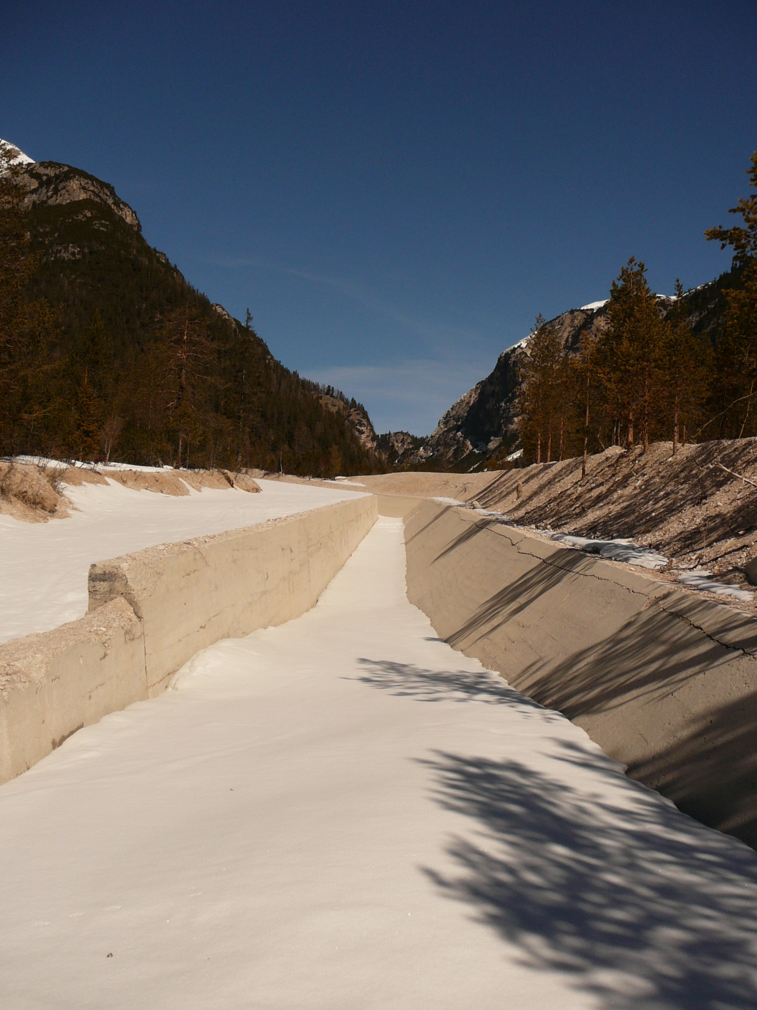 fossato a.c. cimabanche